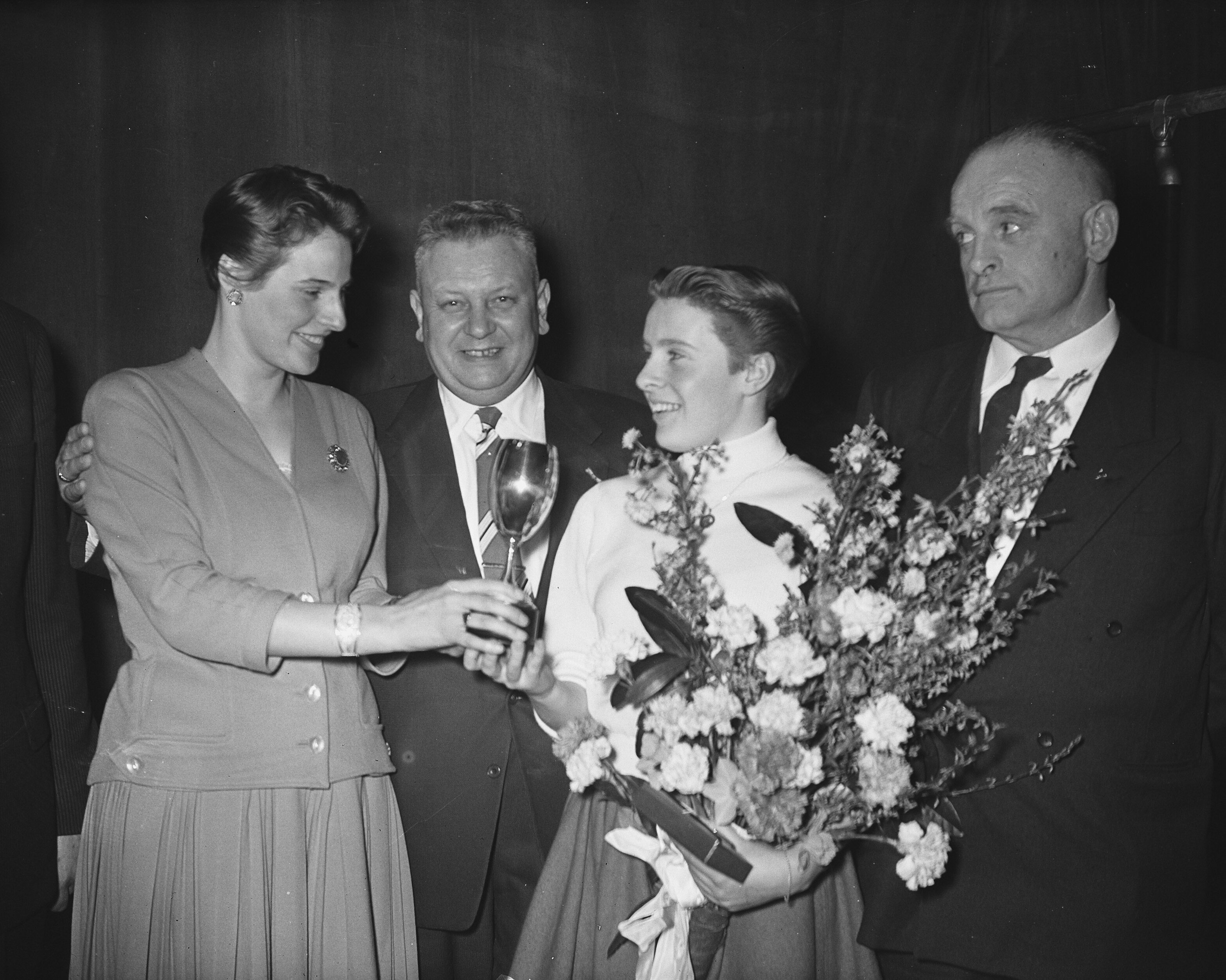 Collectie / Archief : Fotocollectie Anefo Reportage / Serie : [ onbekend ] Beschrijving : AVRO verkiezing Sporter van het jaar 1955. Prijsuitreiking in het Minervapaviljoen te Amsterdam. (midden) Mary Kok sportvrouw 1955, (links) Geertje Wielema die de beker uitreikt (sportvrouw 1954) , (midden) Jan de Vries (voorzitter KNZB). Rechts zwemcoach Jan Stender Annotatie : Er was toen geen onderscheid tussen mannelijke en vrouwelijke sporters. Er was slechts 1 categorie Datum : 8 februari 1956 Locatie : Amsterdam Trefwoorden : prijsuitreikingen, sporters, sportprijzen Persoonsnaam : Kok, Mary, Stender, Jan, Vries, Jan de (KNZB), Wielema, Geertje Instellingsnaam : AVRO Fotograaf : Noske, J.D. / Anefo Auteursrechthebbende : Nationaal Archief Materiaalsoort : Glasnegatief Nummer archiefinventaris : bekijk toegang 2.24.01.09 Bestanddeelnummer : 907-5828